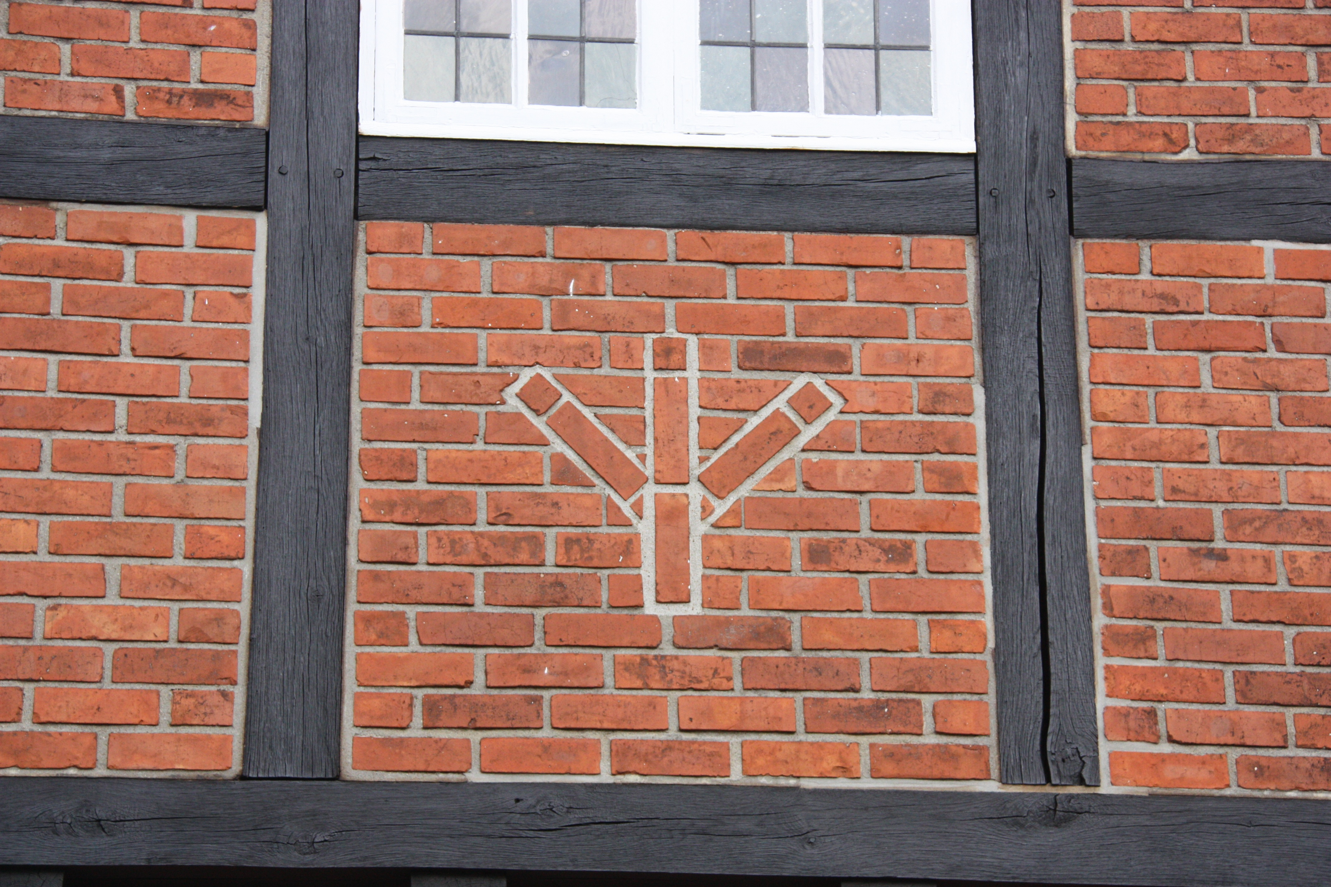 Hamburg, Wellingsbüttel. Lutherkirche, Symbol Südseite, Elhaz-Rune